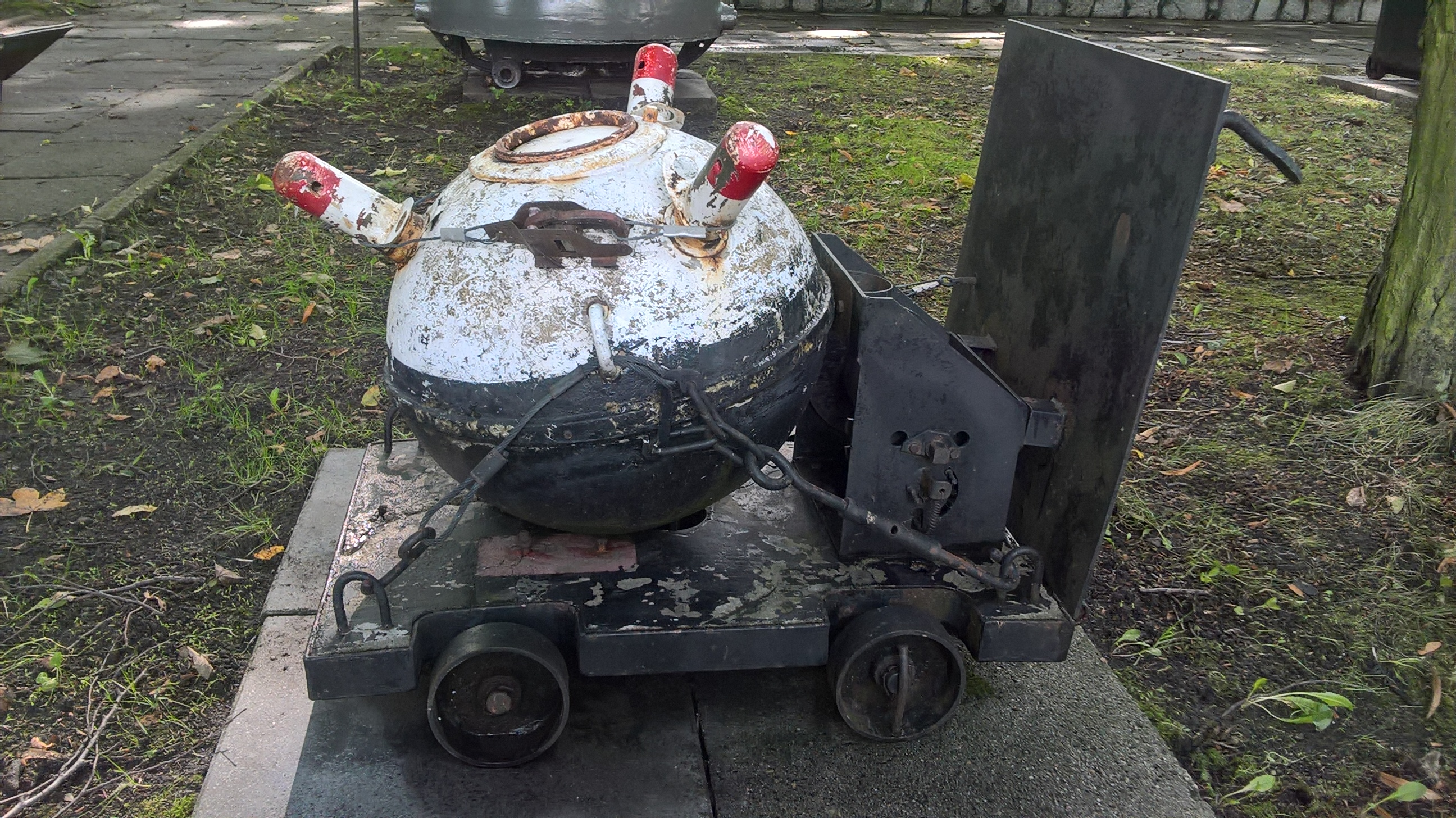 Radziecka mina przeciwdesantowa PDM-3Ja eksponowana w Muzeum Marynarki Wojennej w Gdyni.